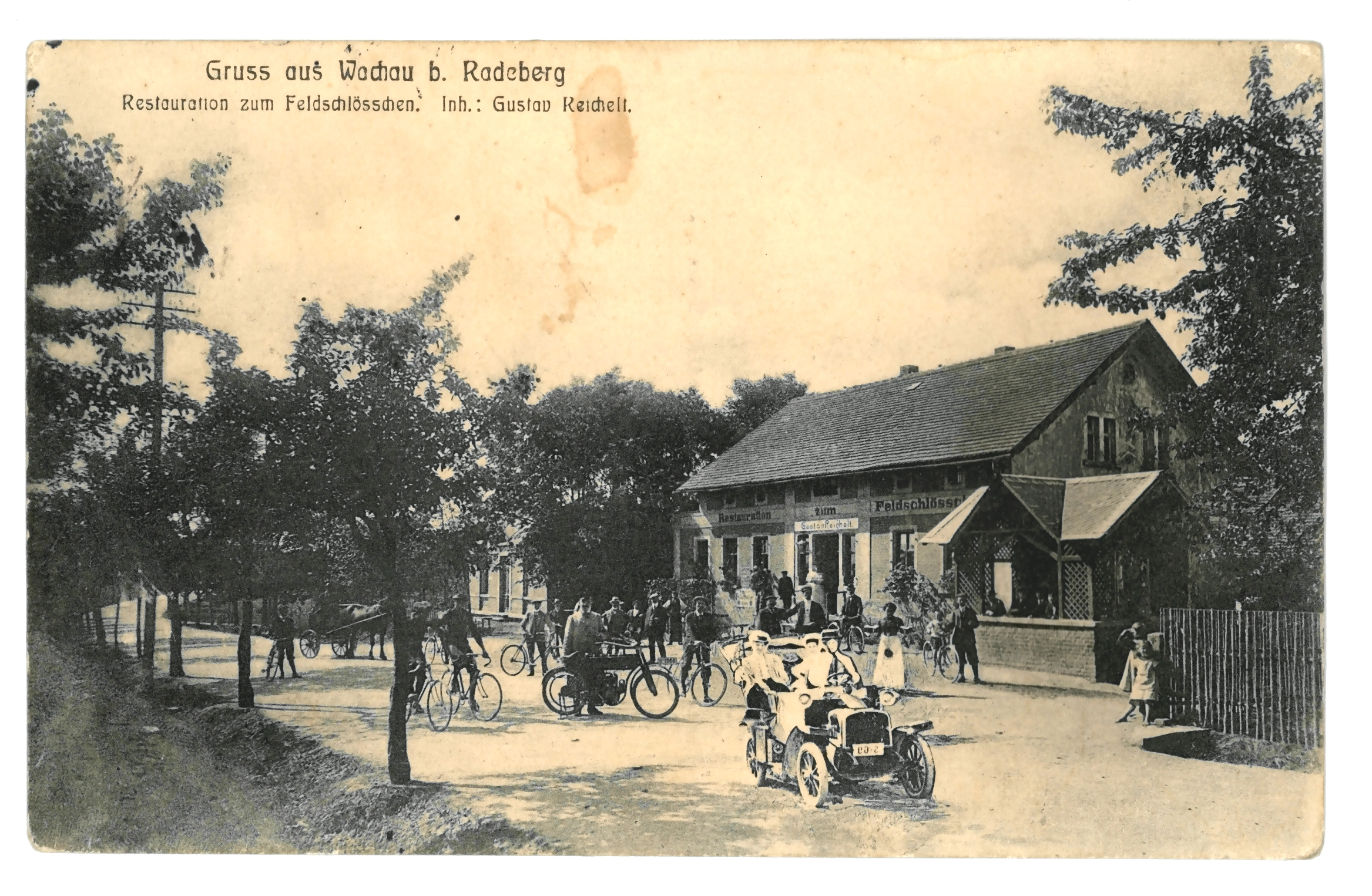 Restauration Feldschlösschen in Wachau (Sachsen), alte Postkarte von 1915